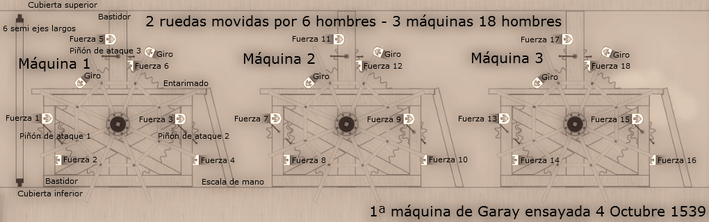 1ª máquina de Blasco de Garay